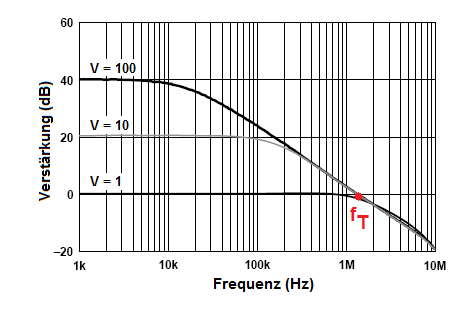 Frequenzgrenze eines OP-Verstärkers als Funktion der Verstärkung